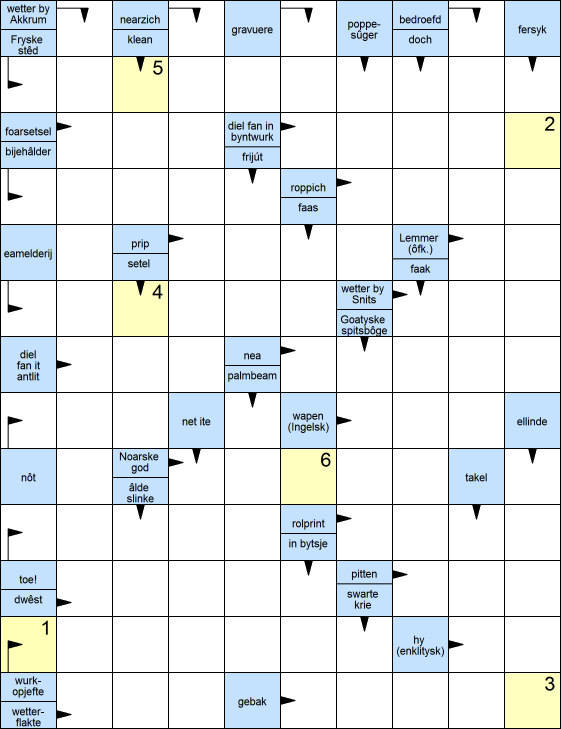 Frysktalige Sweedske Zweedse puzel